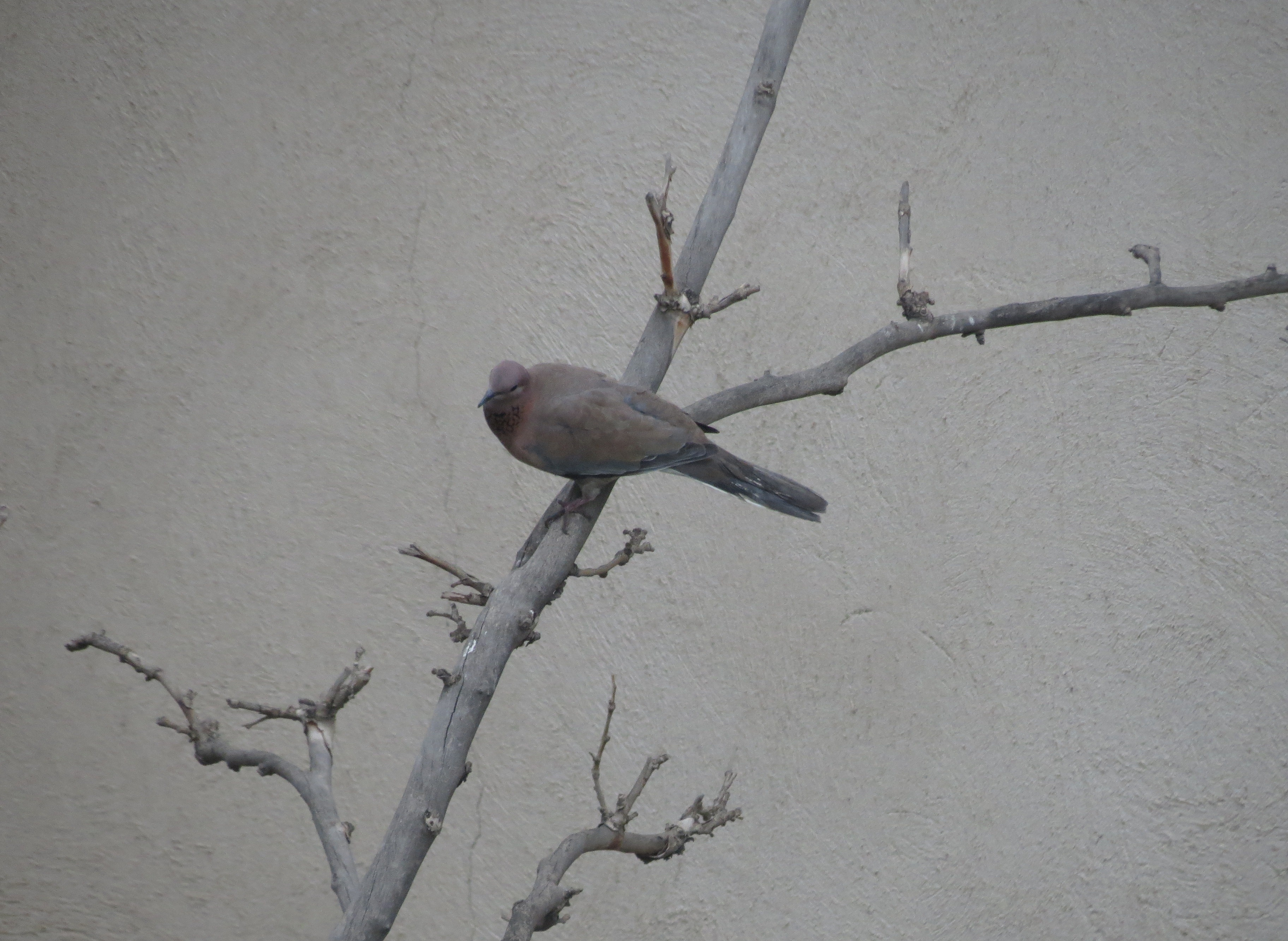 کبوتری برشاخه